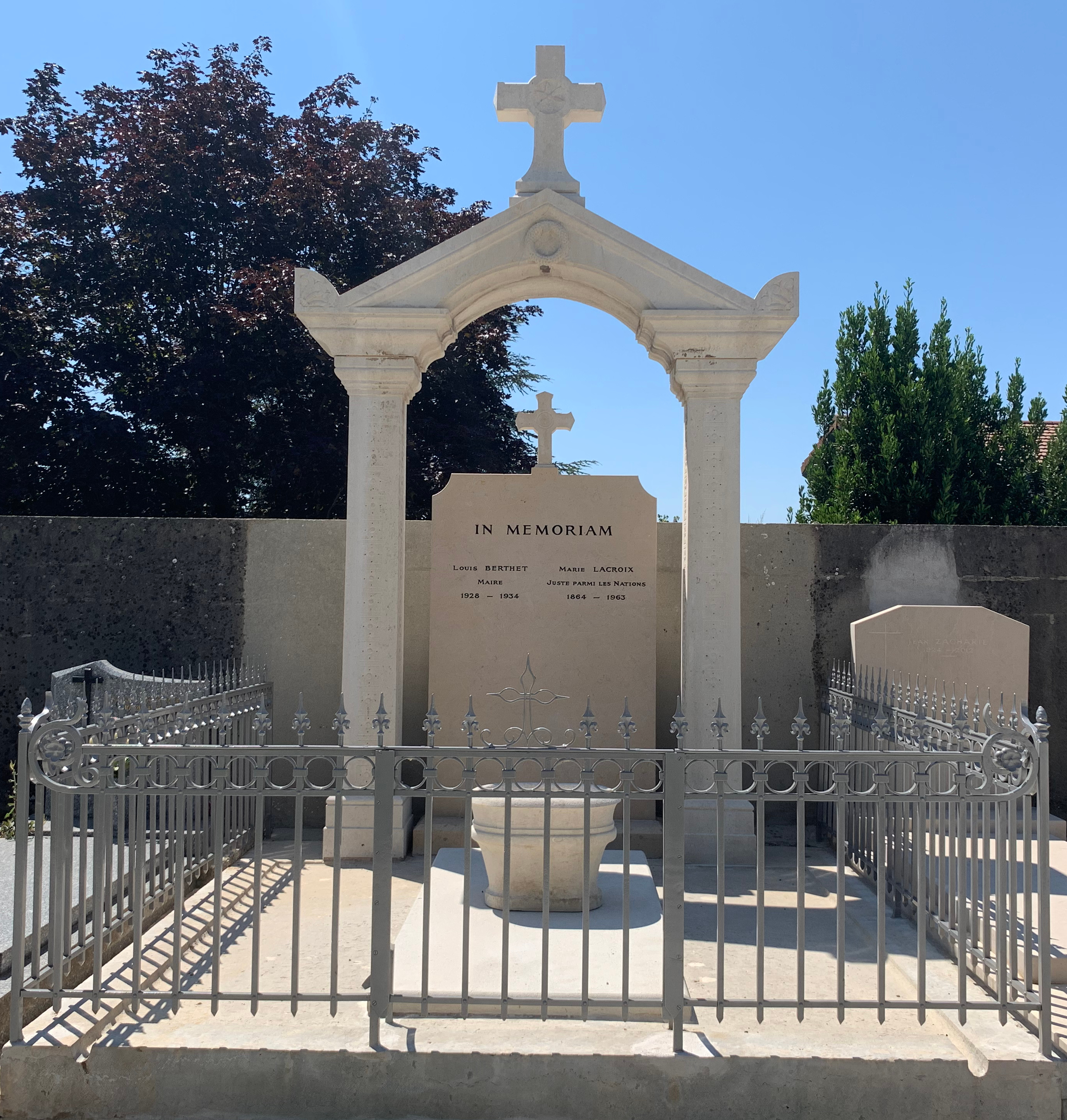 Tombe de Louis Berthet (maire) et de Marie Lacroix (Juste parmi les Nations) à Miribel (Ain, France).